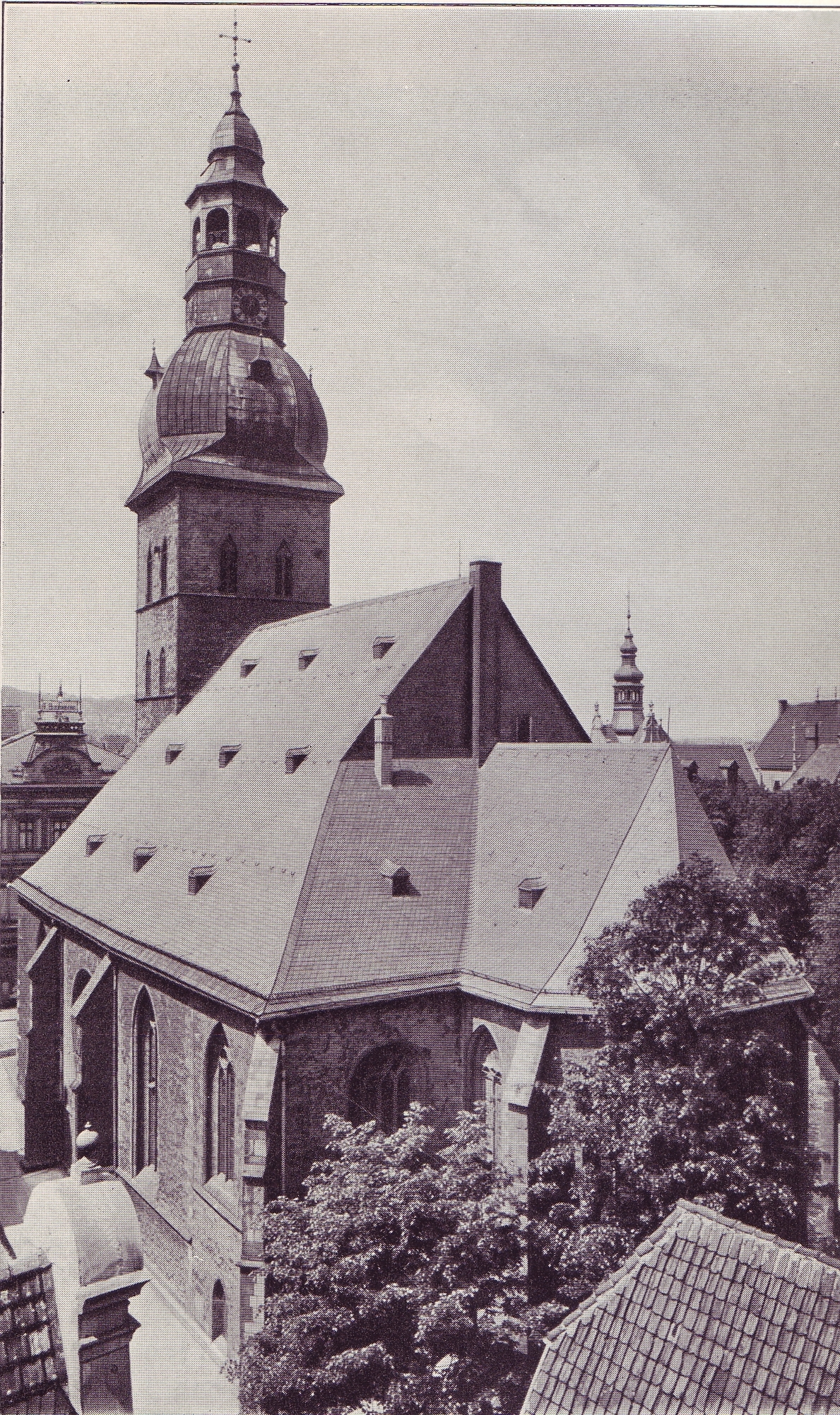 Altstädter Nicolaikirche Bielefeld